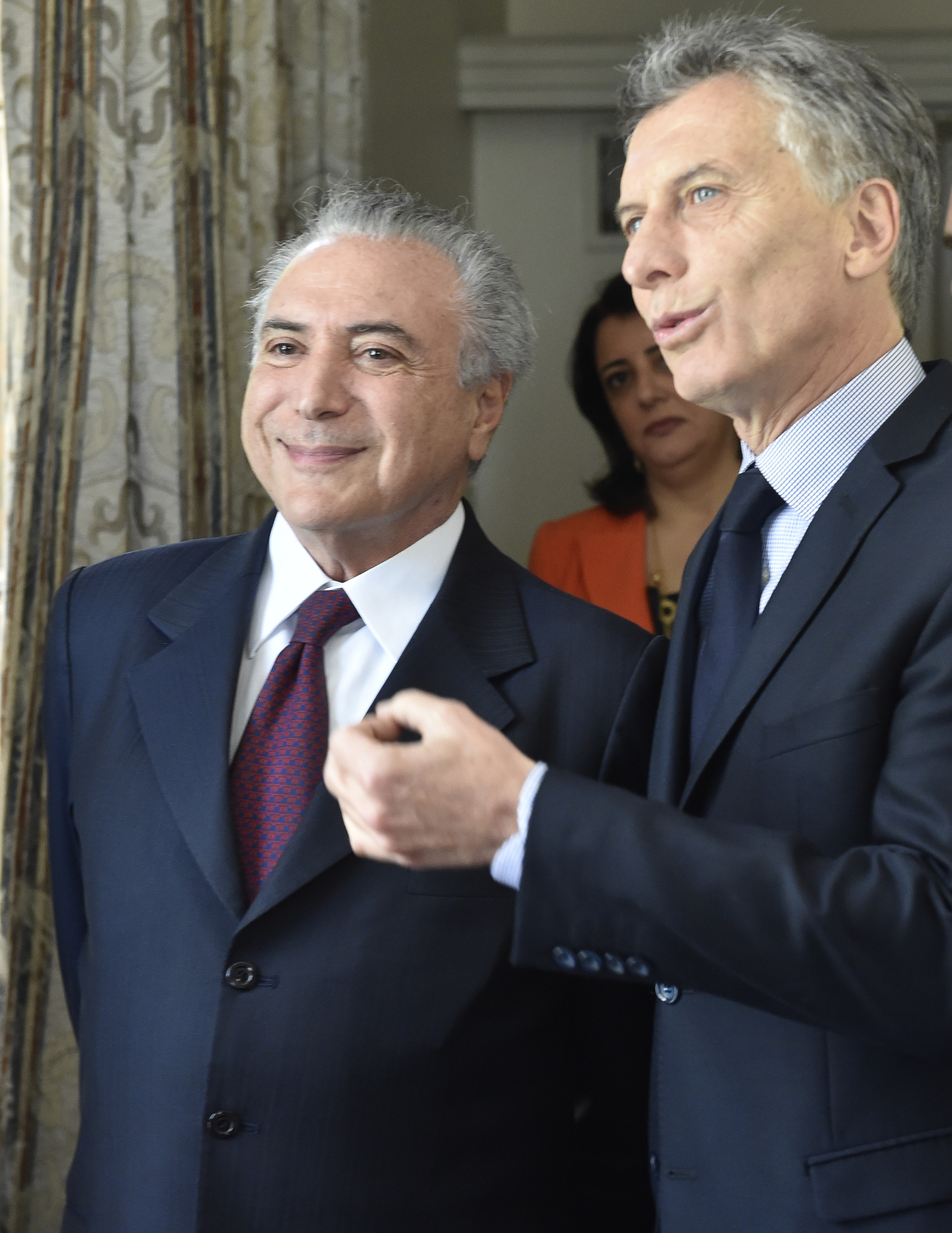 Los presidentes de la Argentina, Mauricio Macri, y de Brasil, Michel Temer, en la Residencia de Olivos.